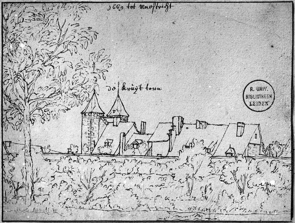 Helpoort: sepiatekening (1669) in de verzameling Bodel Nijenhuis in de Universiteitsbibliotheek te Leiden